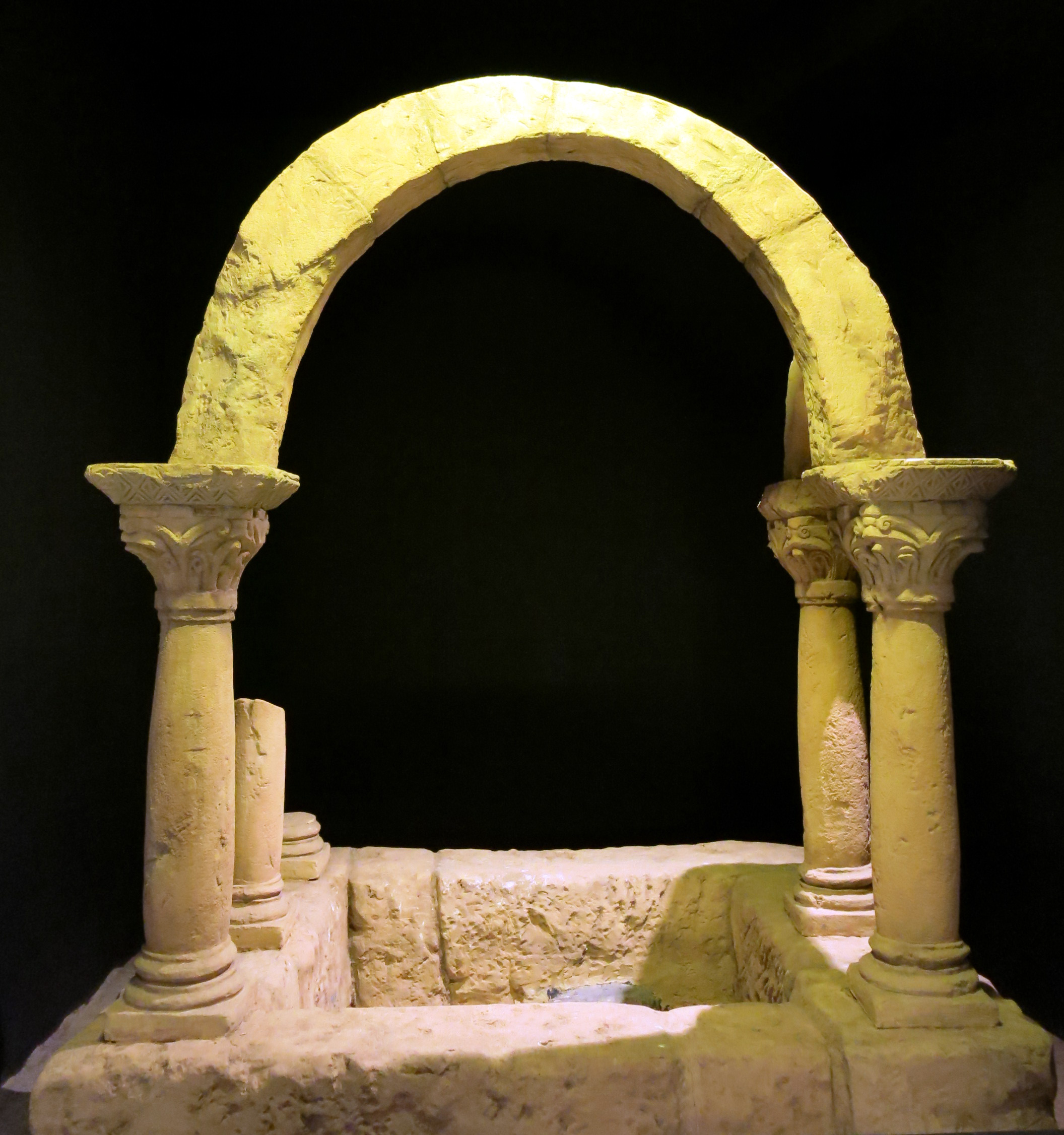 Magatzems generals del Dipòsit (Barcelona). Inclouen el Museu d'Història de Catalunya